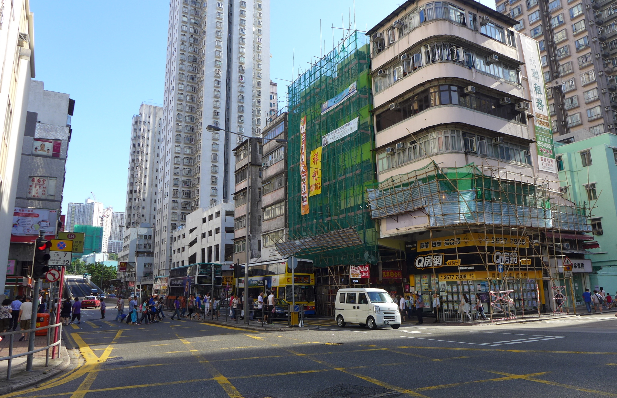 Aberdeen Main Road